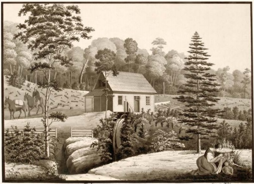 Imagen del Fundo San Juan en La Unión en el año 1856, trabajo realizado por Rodolfo Amando Philippi